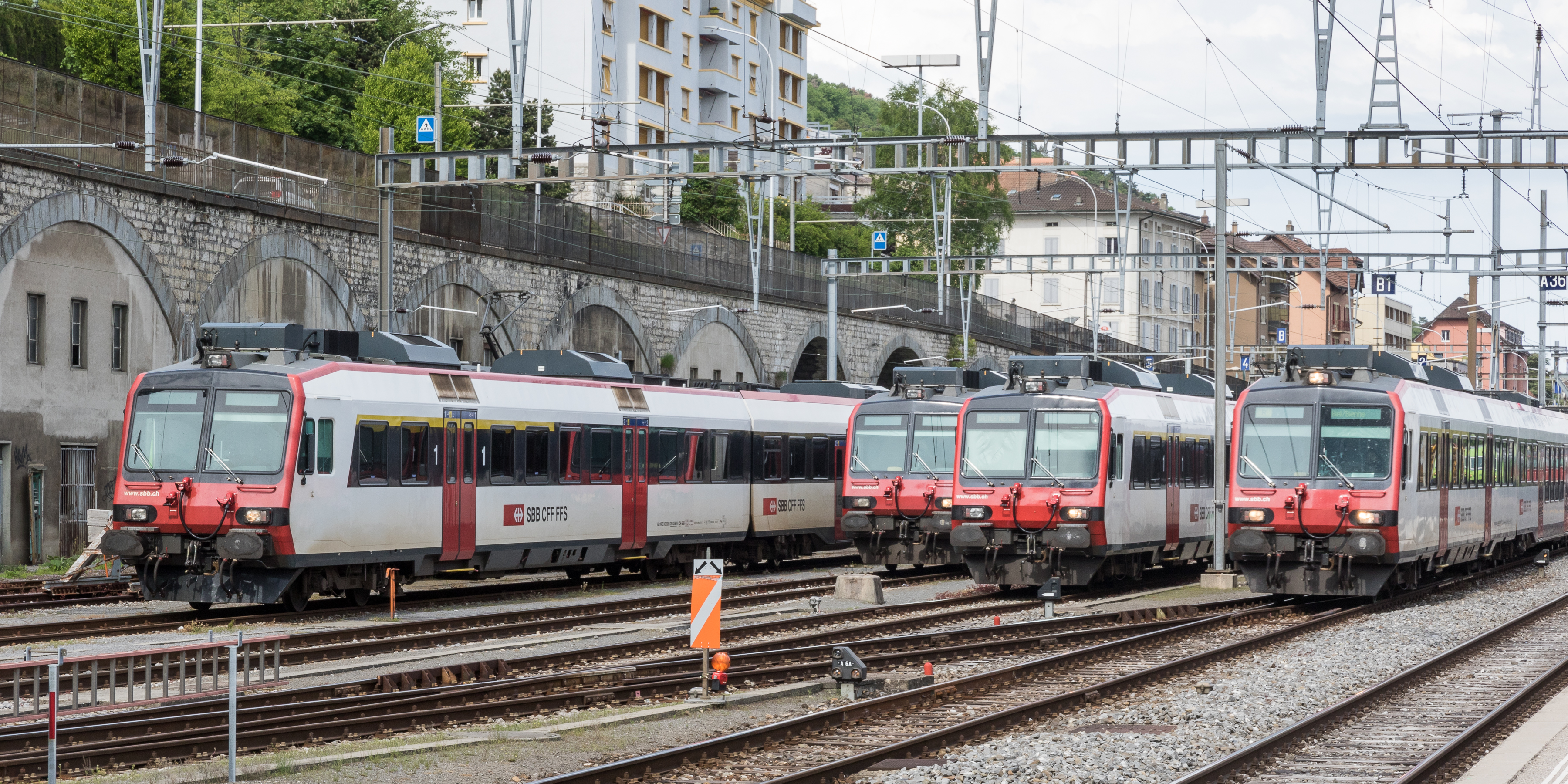 NPZ-Parade (4 Steuerwagen ABt nebeneinander) im Bahnhof Neuchâtel